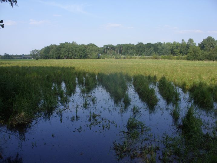 Naturschutzgebiet „Allertal zwischen Gifhorn und Wolfsburg“